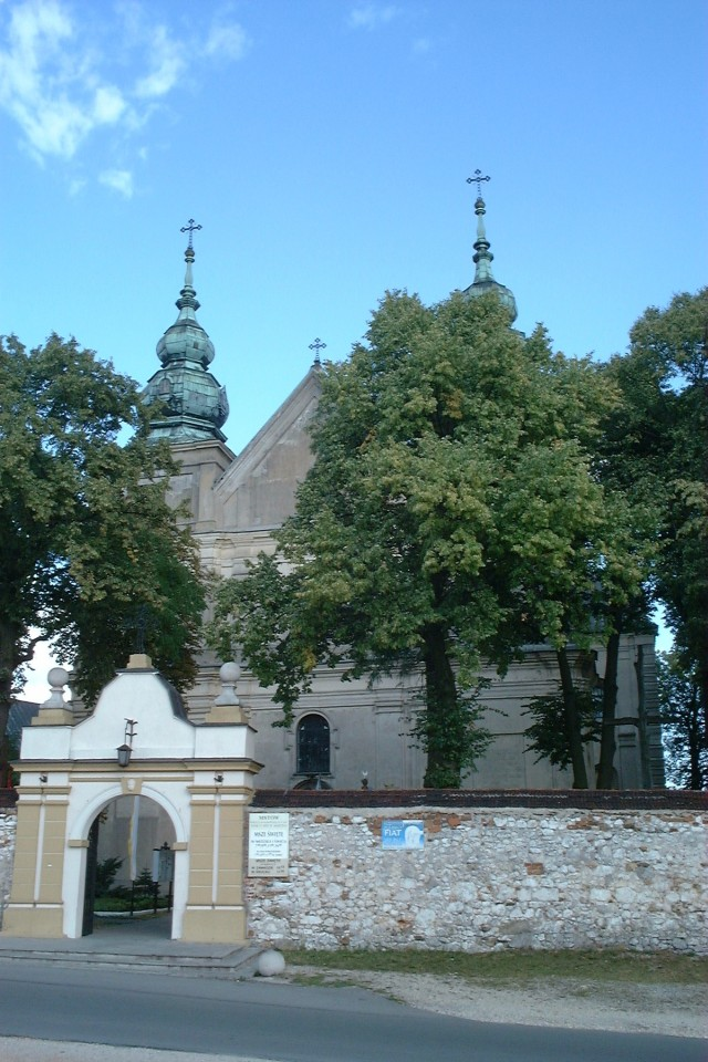 Poland, Mstów - church.